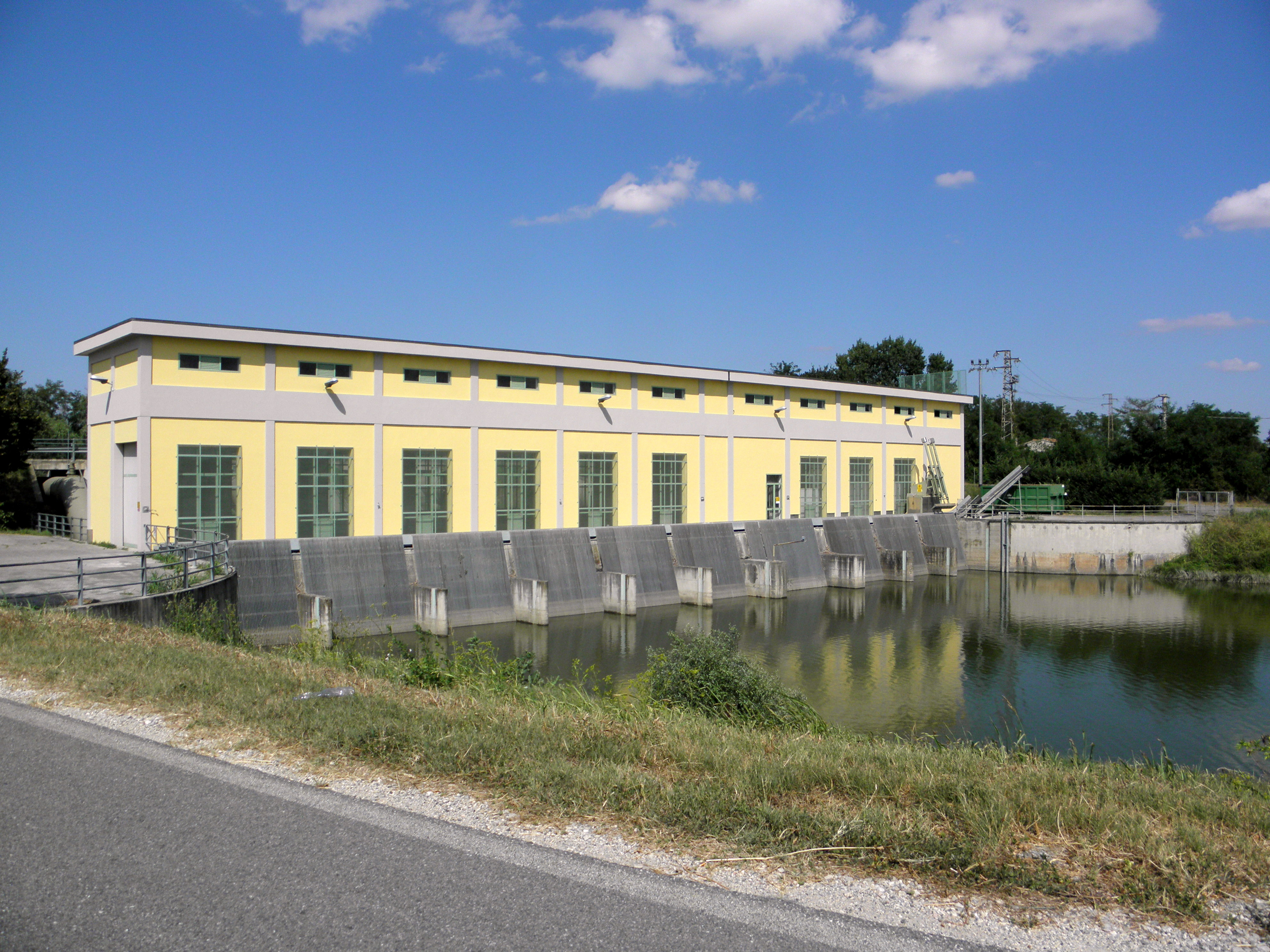 Bresparola, località di Bosaro: l'idrovora che regola il livello d'acqua del Canalbianco collegandosi con la rete di canali sottostanti tra il comune di Bosaro e quello di Polesella.